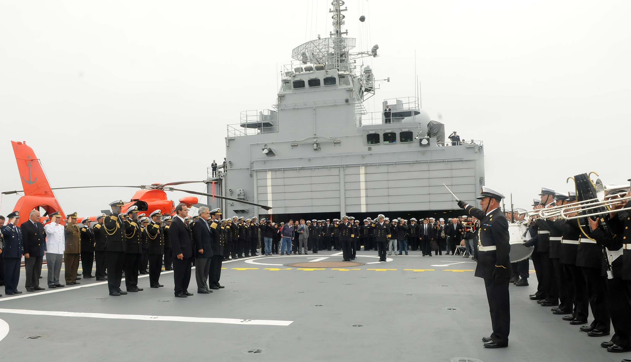 Año 2012